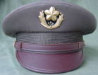 70式曹士、及び初期幹部正帽